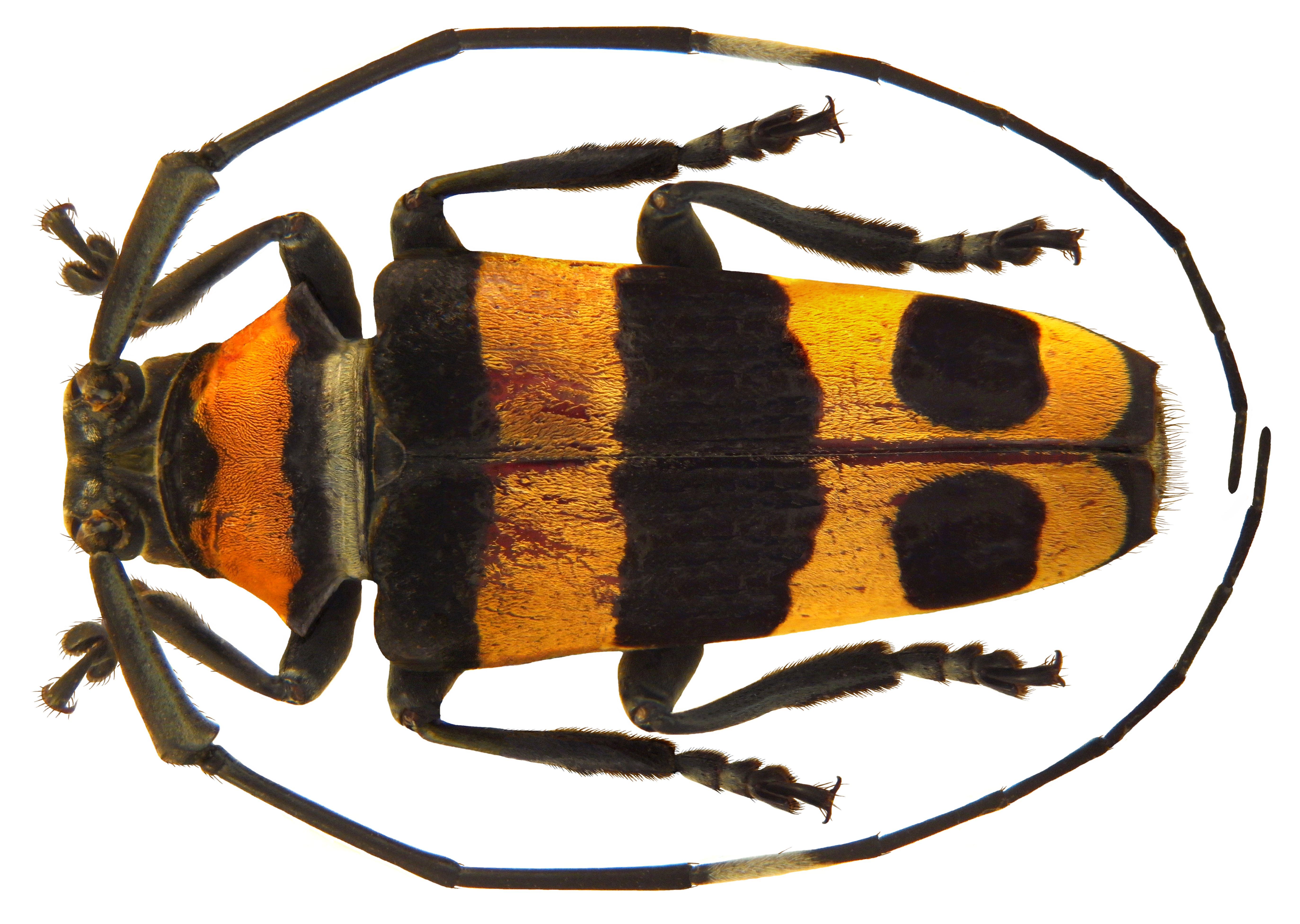 Familie: Cerambycidae Groesse: 20,5 mm Fundort: Philippinen, Leyte, Catmon, Bantawon Mts., 500 m leg. Medicielo, 1997; det. A.Weigel, 2010 Photo: U.Schmidt, 2010